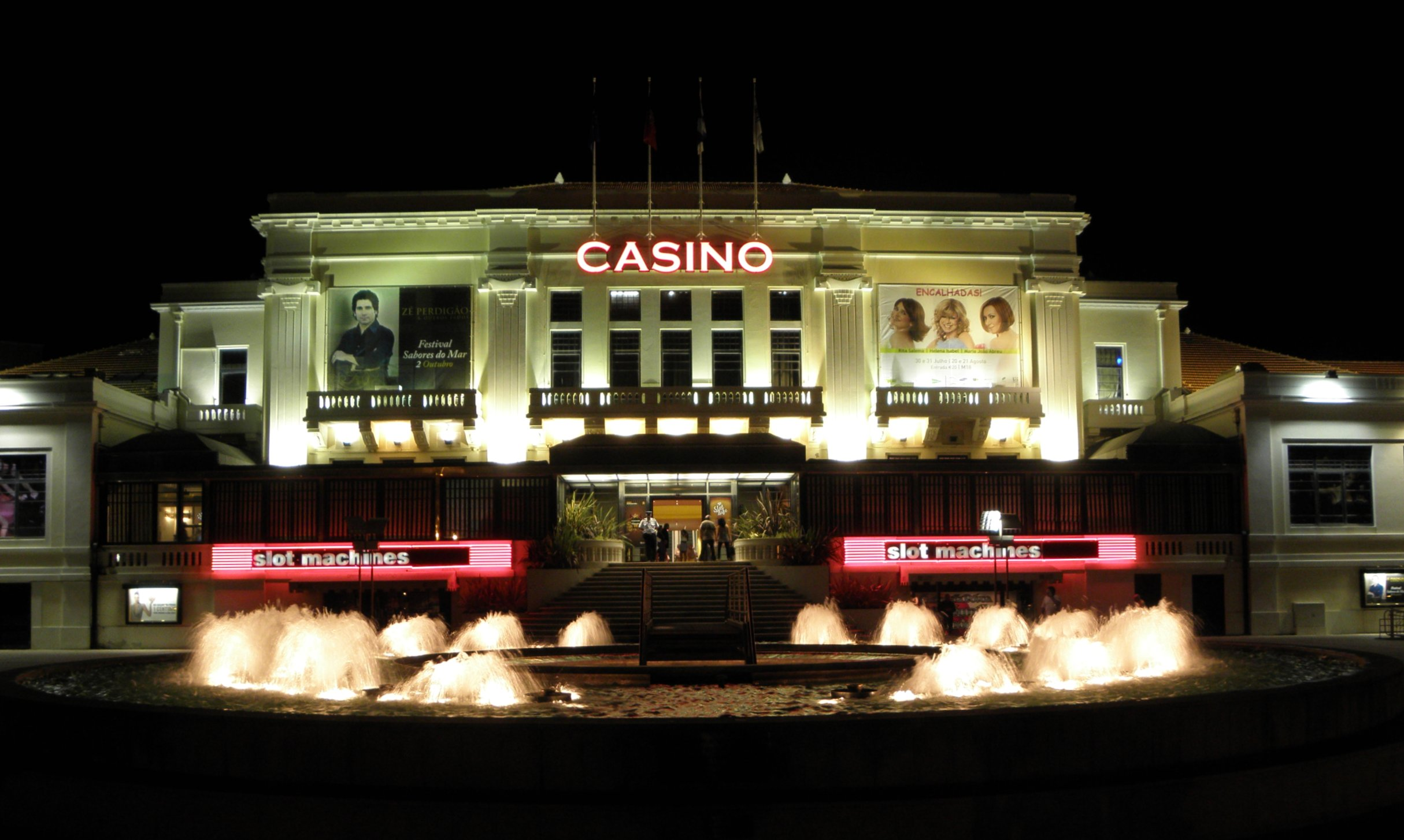 Casino de Povoa de Varzim